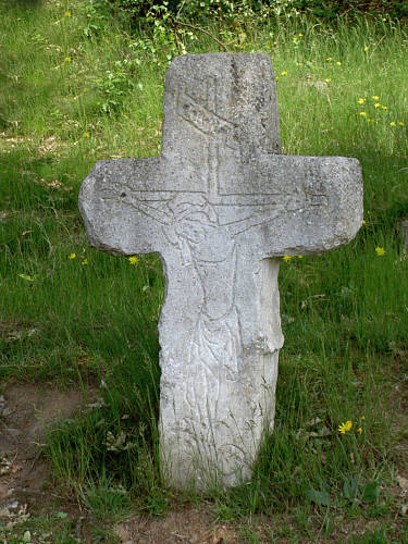 Steinkreuz